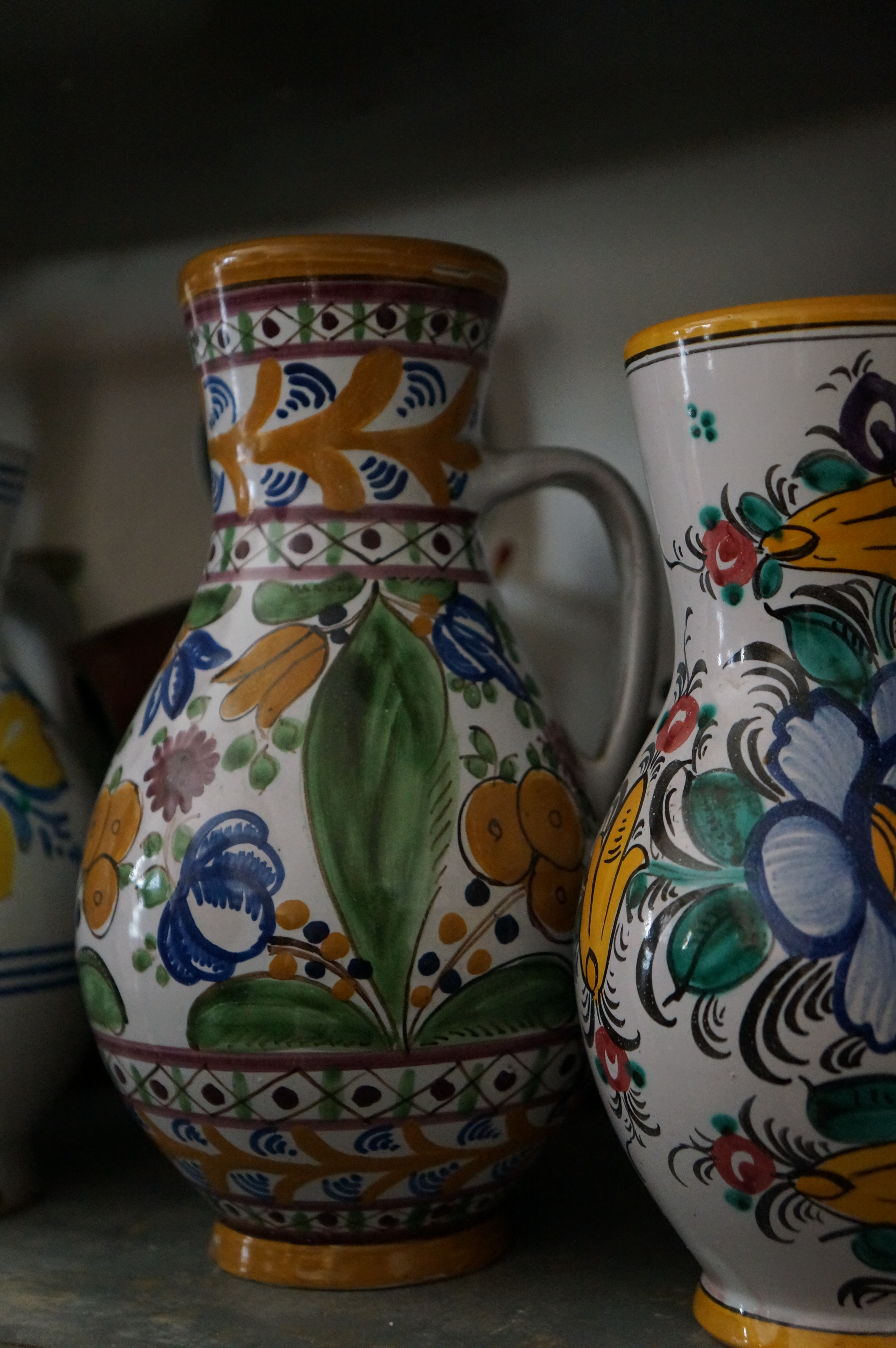 Small pottery factory in Modra, Slovakia